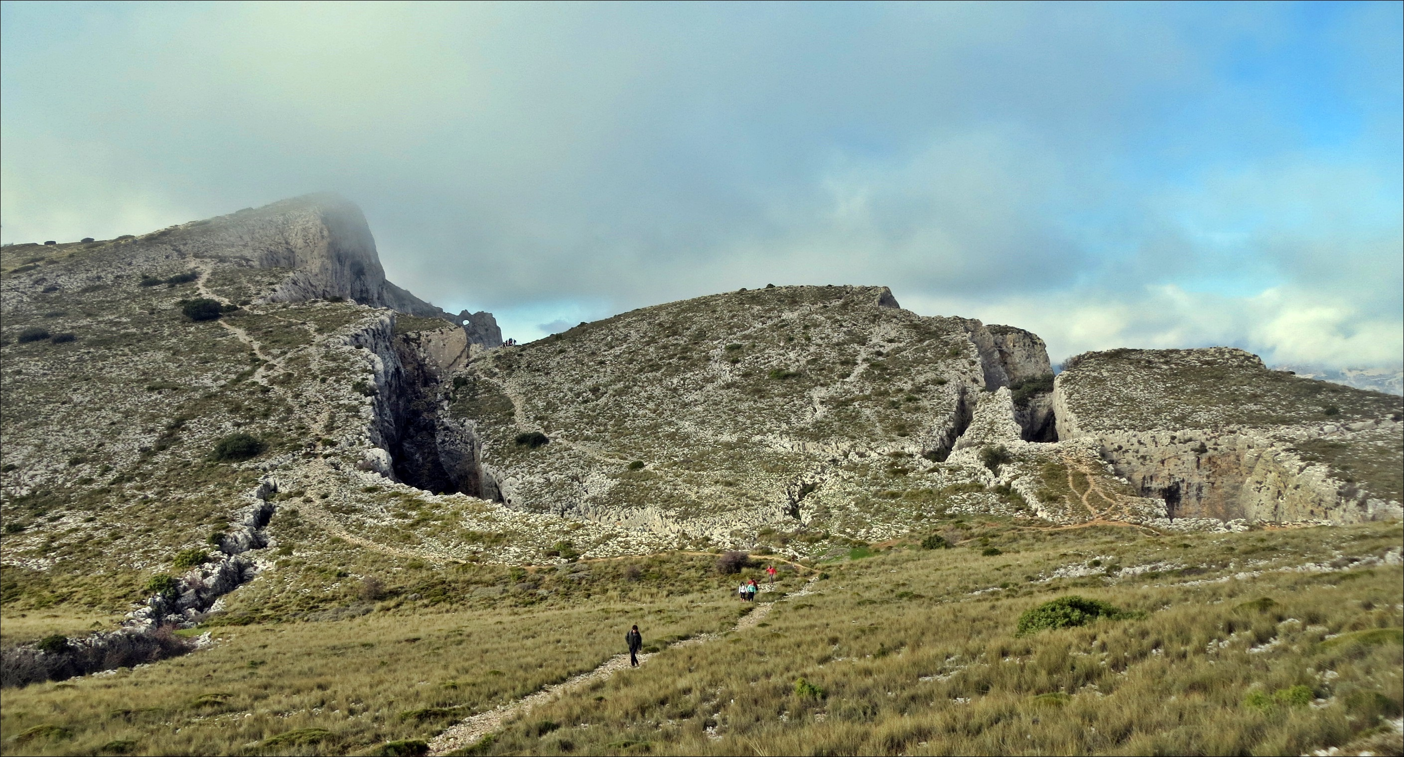 Vistas desde la senda que conduce al collado de Tagarina